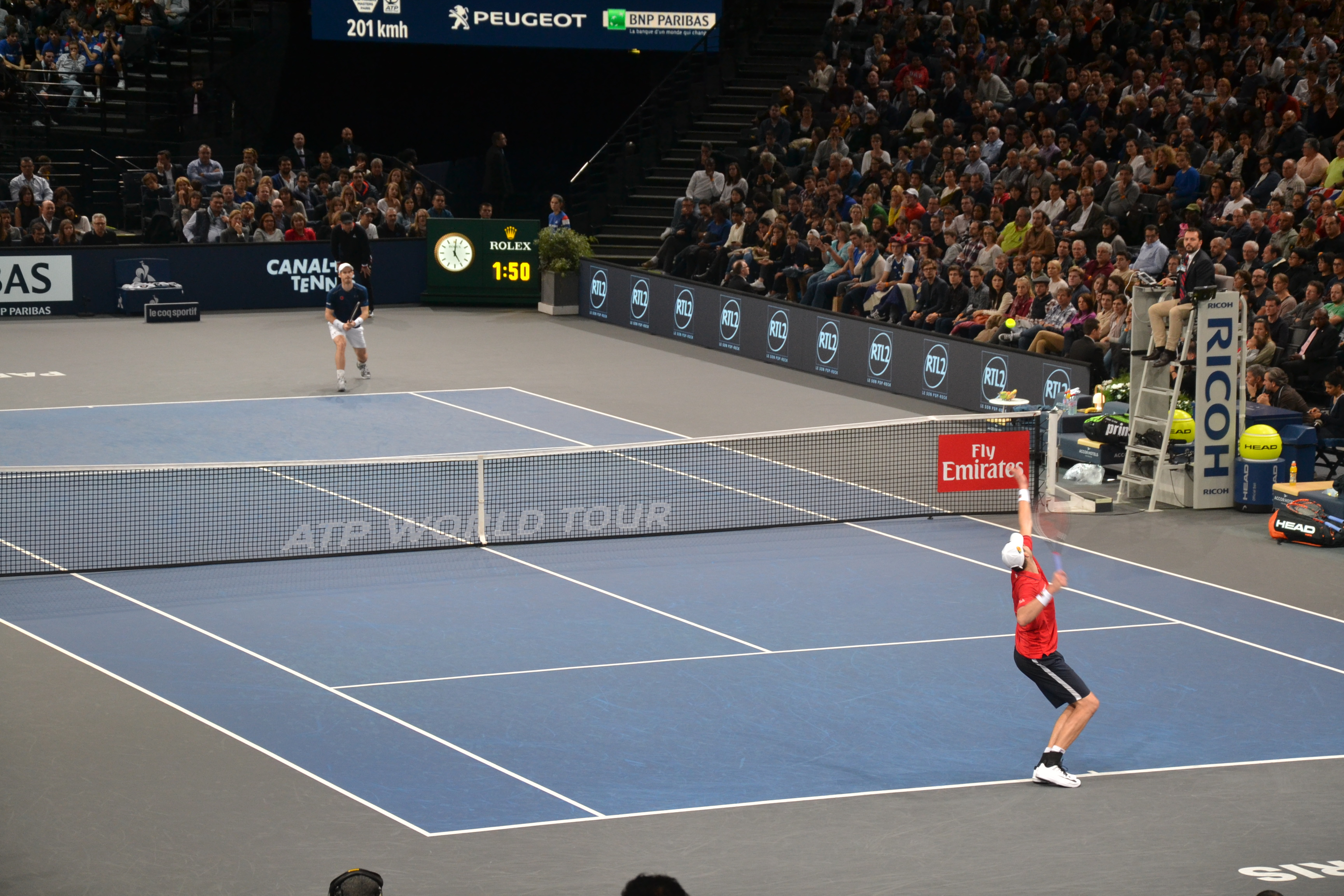 Finale de l'édition 2016 du Masters 1000 de tennis masculin de Paris Bercy, entre Andy Murray et John Isner.